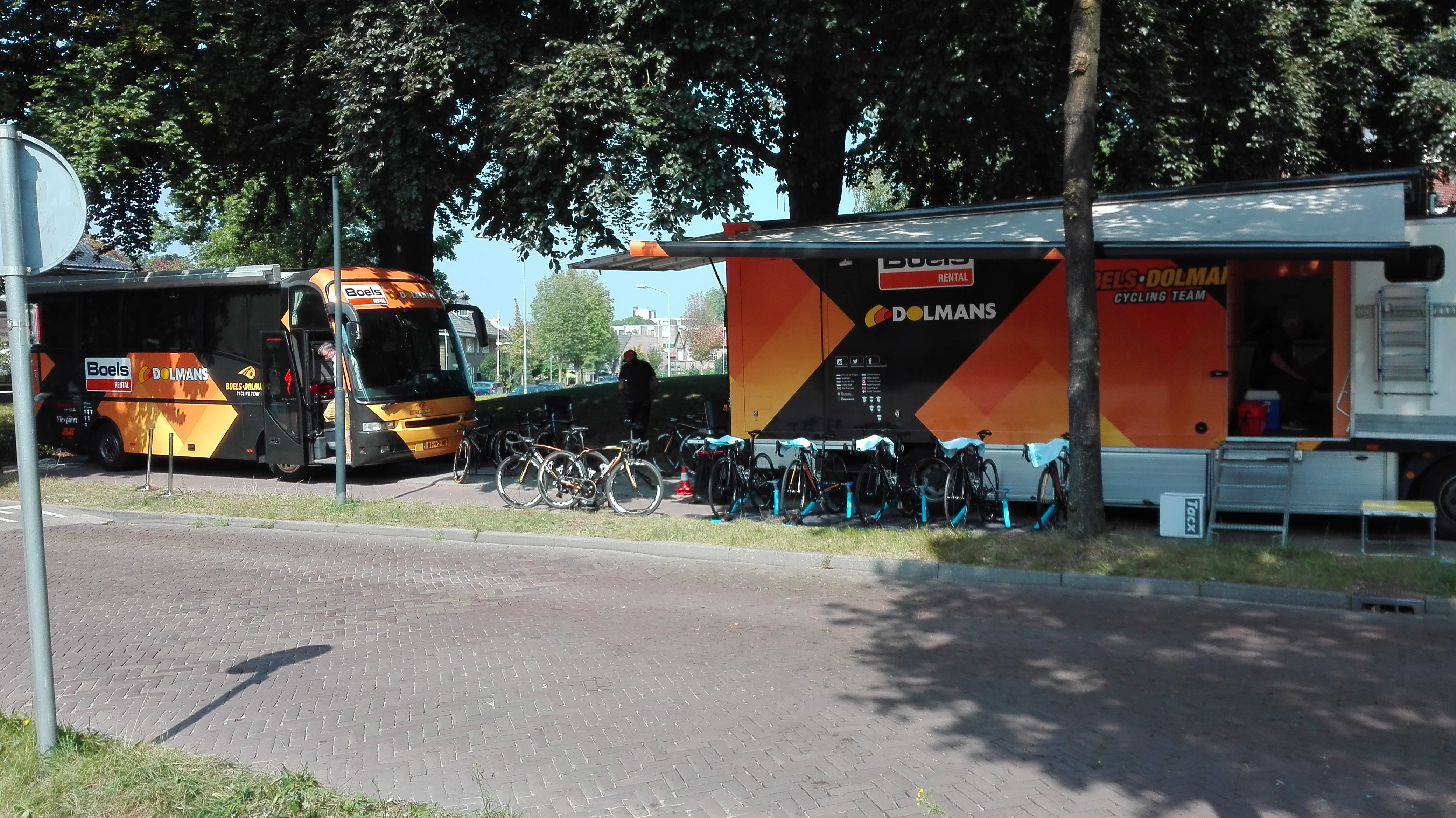 Boels Ladies Tour 2017, Wageningen - Prologue